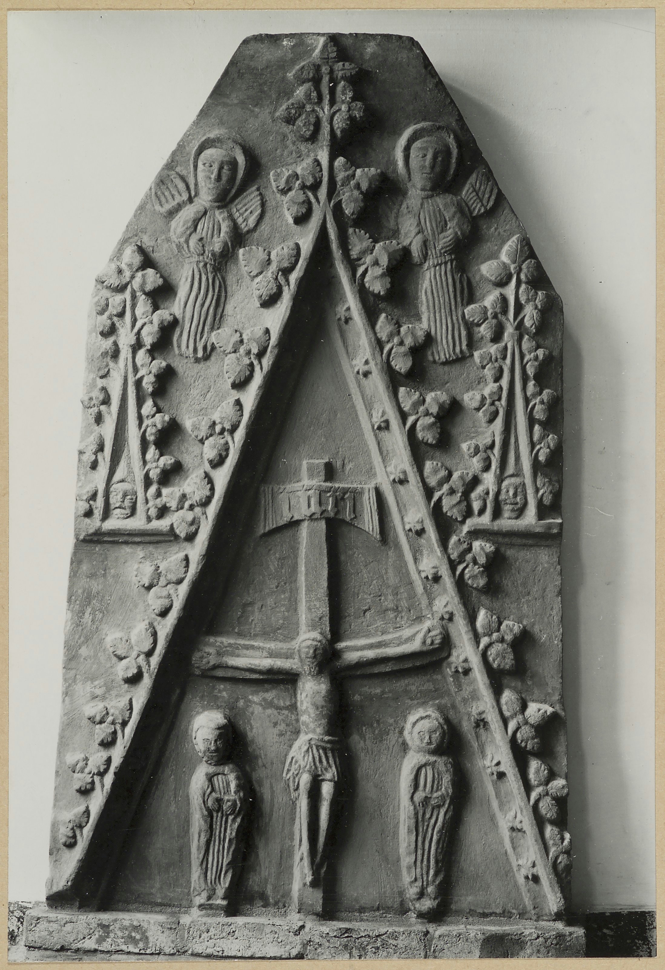 Nederlands Hervormde Kerk: Fragment retabel (opmerking: Bijschrift: In 1947 gevoegd bij verz. in Friesch Museum te Leeuwarden - in Kornwerd een gipsafdruk. [...] roode zandsteen) - Cornwerd, Dorpsweg 5 - Bonifatius